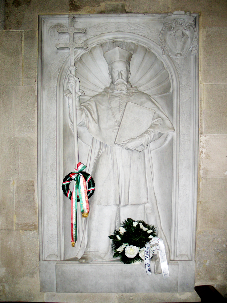 Reliéf Peter Pázmáňa, kardinála, ostrihomského arcibiskupa, turčianskeho prepošta, pedagóga, náboženského spisovateľa, politika (* 04.10.1570, Varadín, Uhorsko (dnes Oradea, Rumunsko) - † 19.03.1637, Bratislava). Reliéf z roku 1914 je dielom sochára Alojza Rigeleho